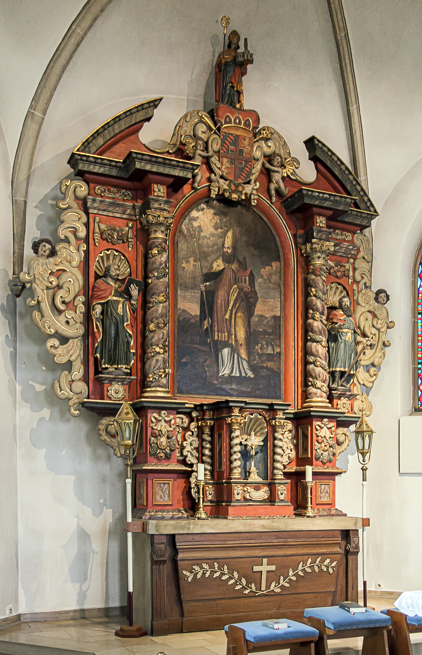 Elte, St. Ludgerus, Hauptaltar